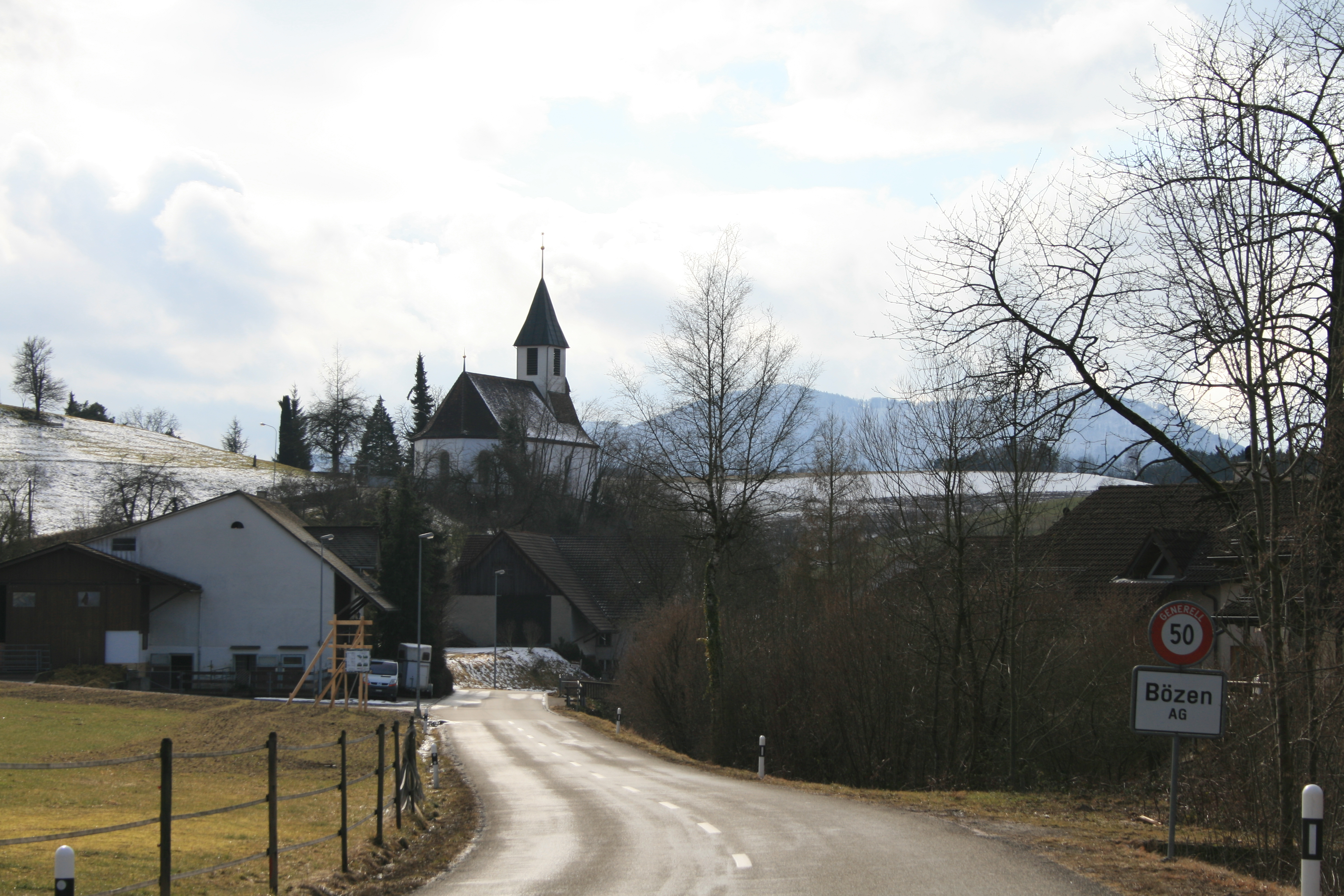 Bözen: Ortstafel und Kirche